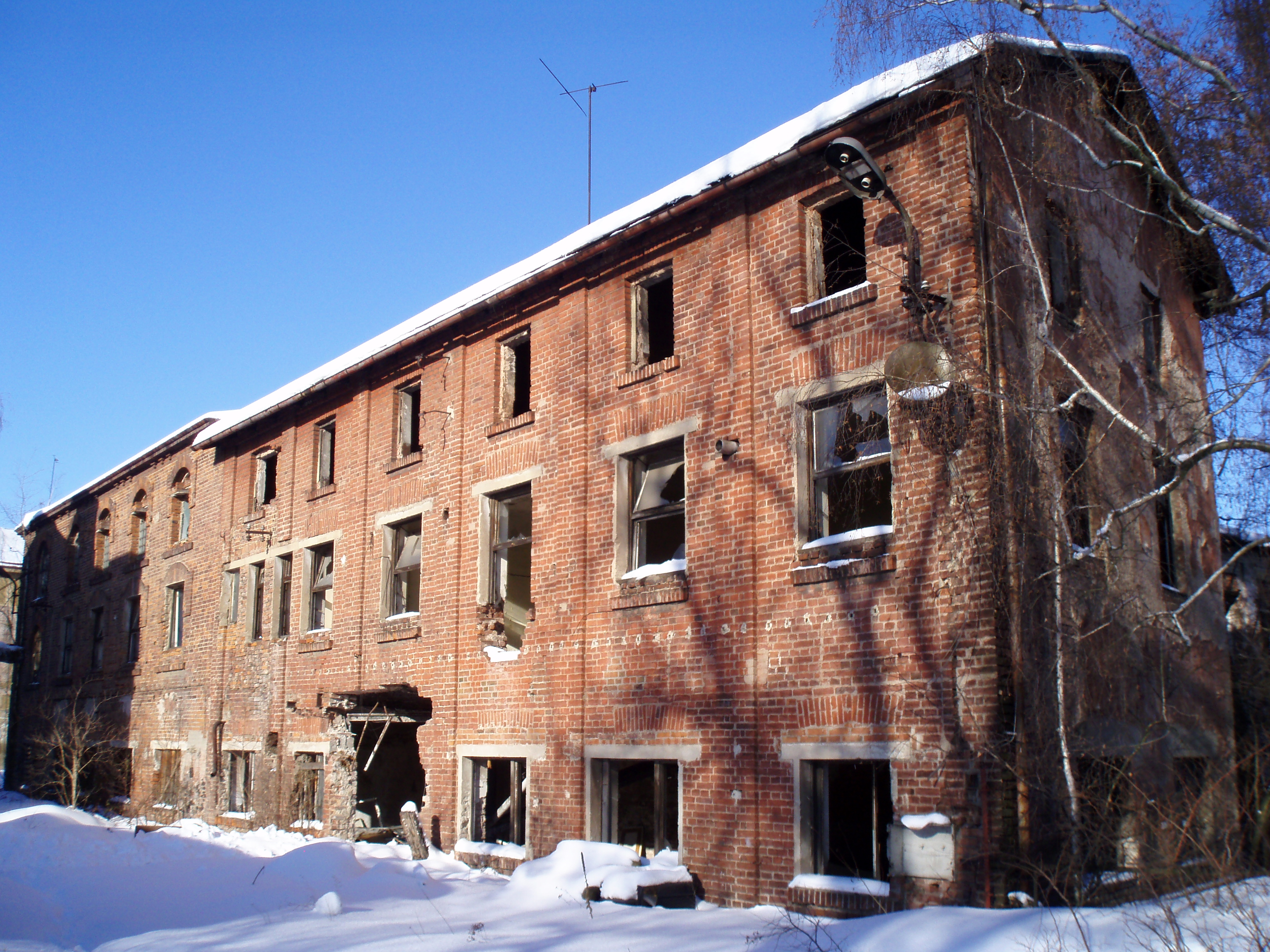 Kuklenská koželužna